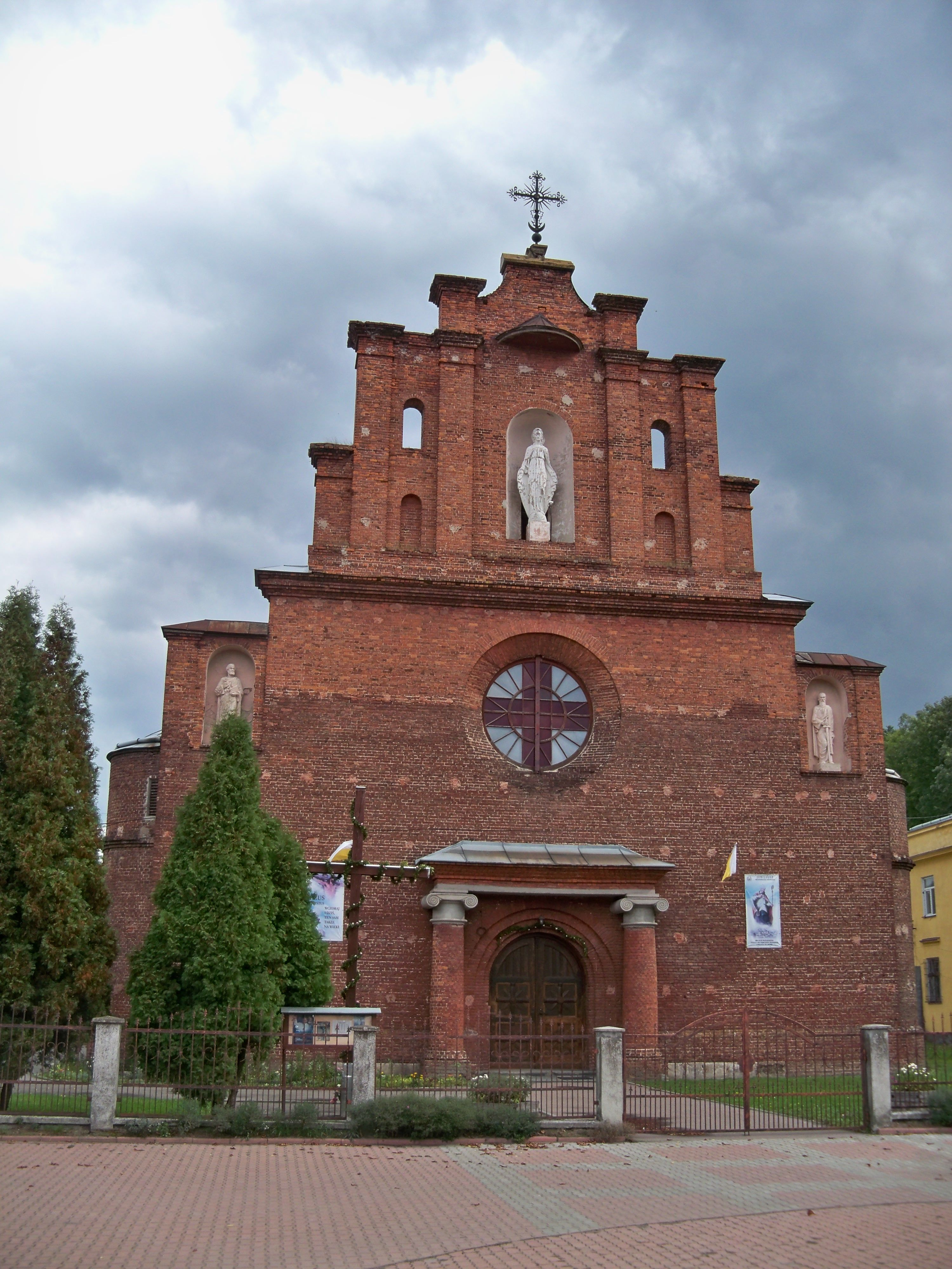 Костел Здвиження (мур.), Городок, вул. Львівська, 4